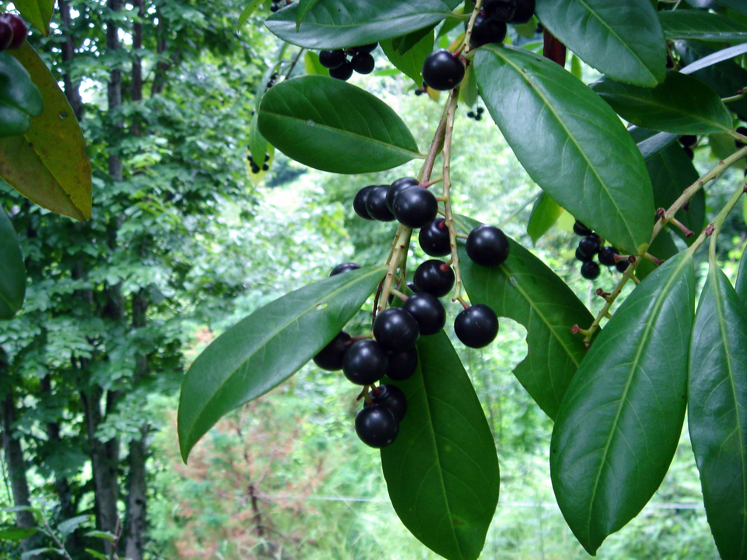 Karayemiş (Prunus laurocerasus)